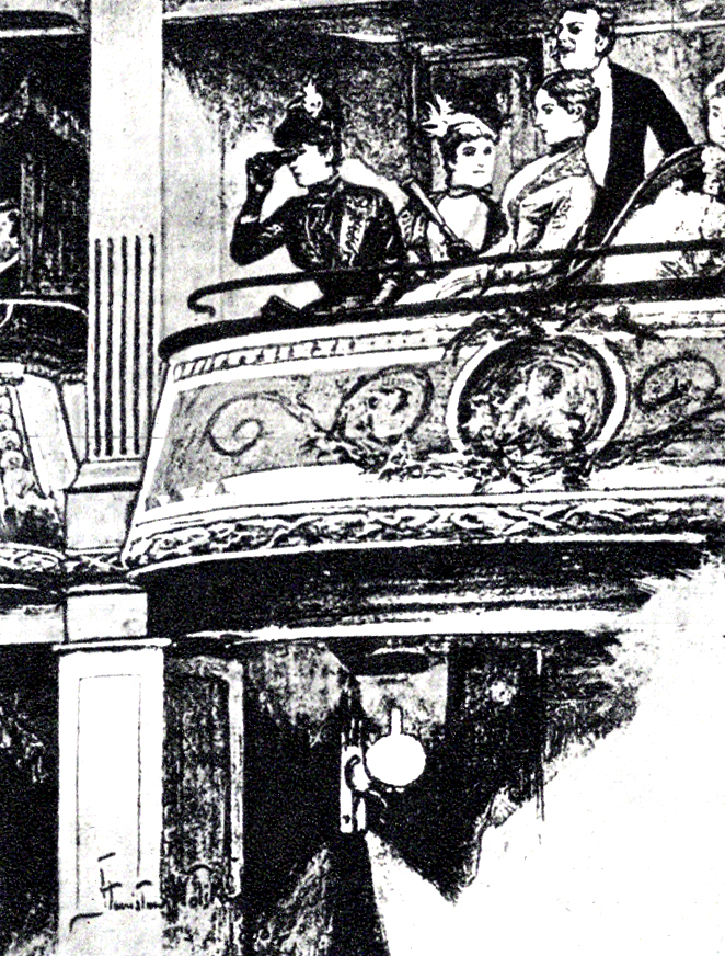 Ilustracja Stanisława Wolskiego do "Lalki" Bolesława Prusa, pt. "Loża pierwszego piętra".